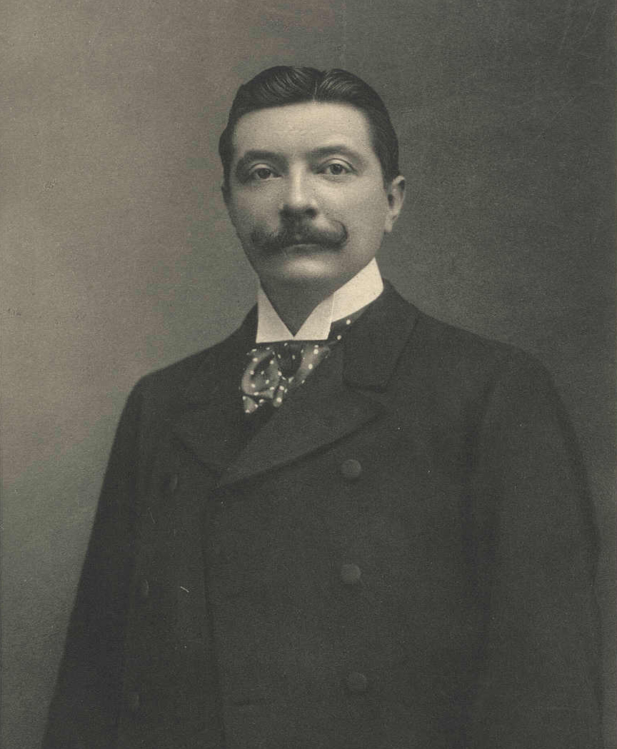 Henri van Dievoet, architecte. Portrait paru dans "La Belgique d'aujourd'hui", sous la direction de Gustave DELTOUR, Berlin-Charlottenburg, Adolf Eckstein, vers 1908.